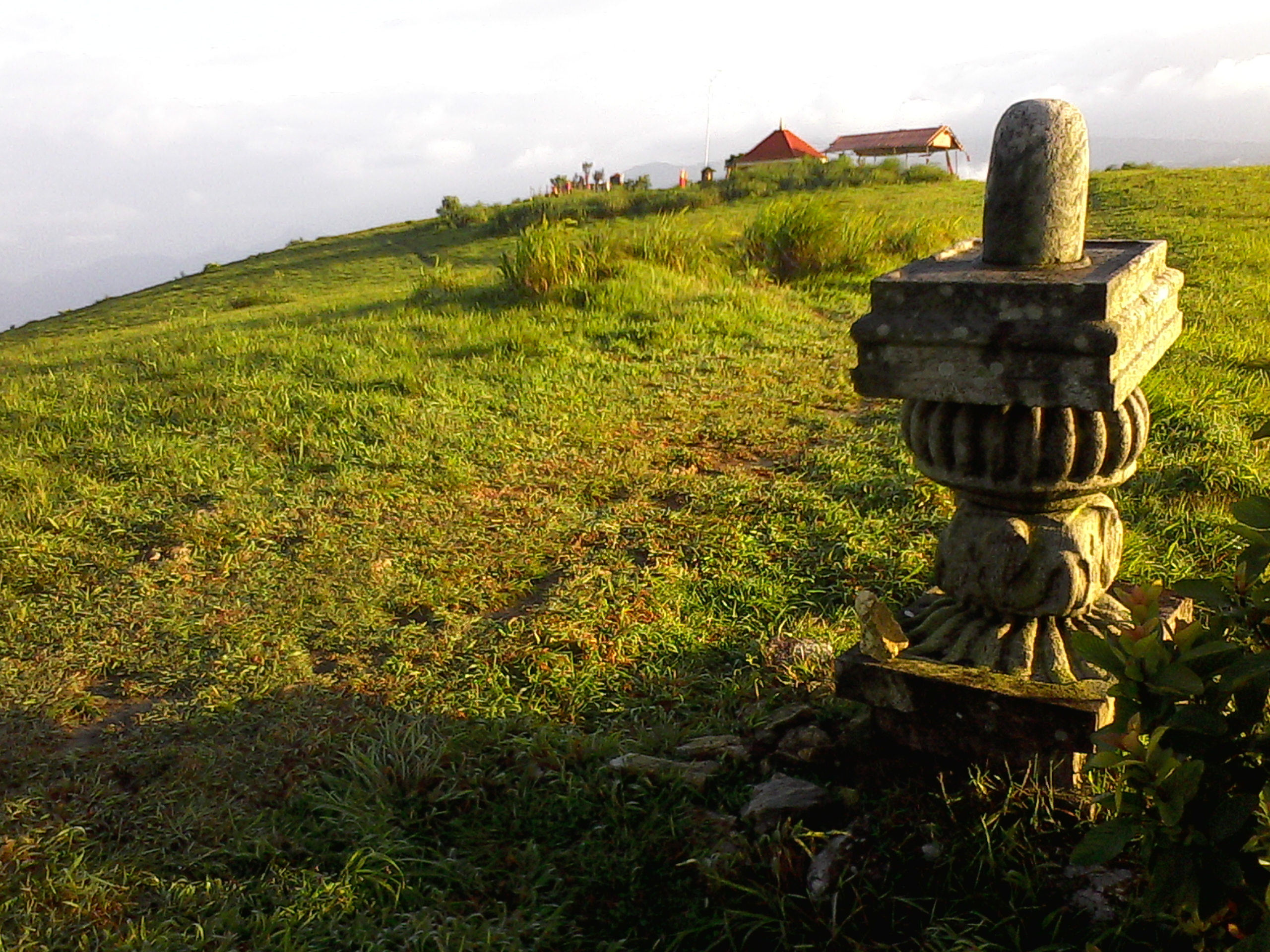 പാഞ്ചാലിമേട്ടിലെ തകർന്ന ശിവലിംഗം